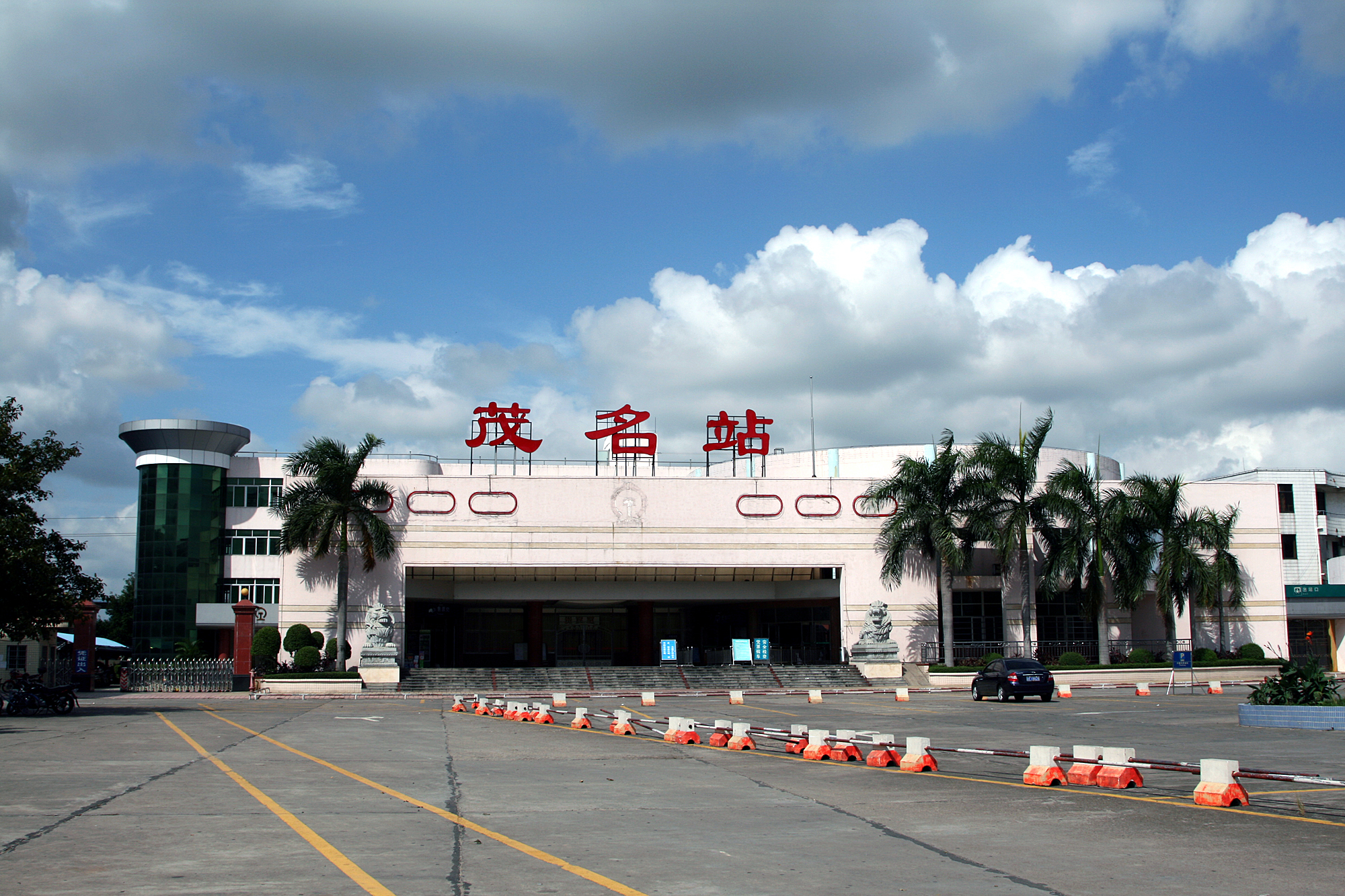 茂名站